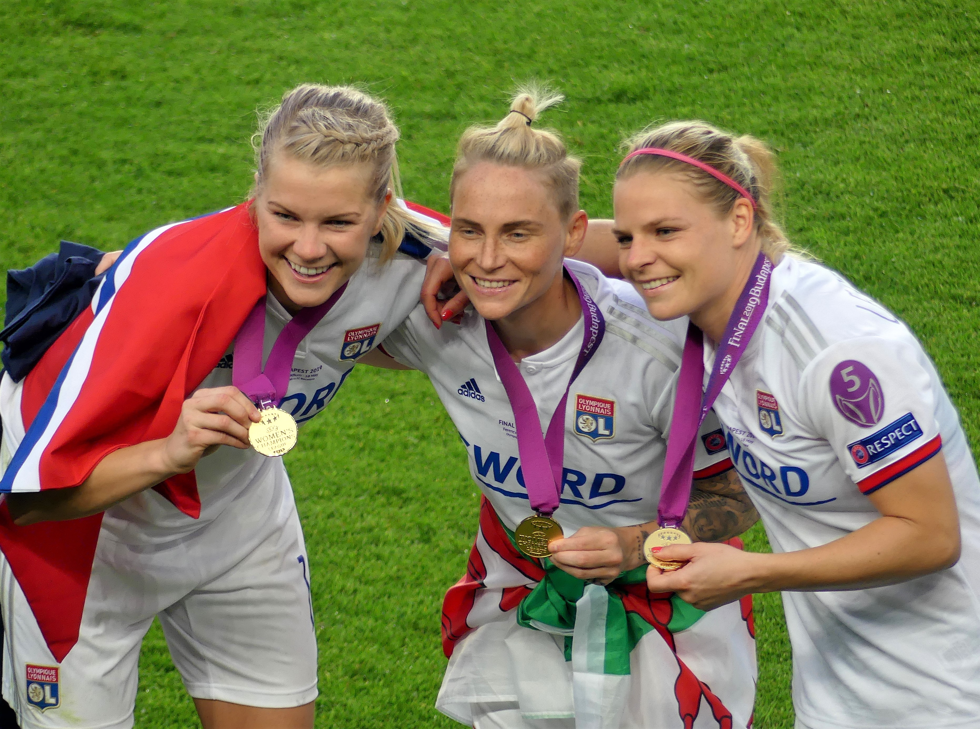 Ada Hegerberg, Jessica Fishlock et Eugénie Le Sommer célébrant la victoire en Ligue des champions le 18 mai 2019 à Budapest.